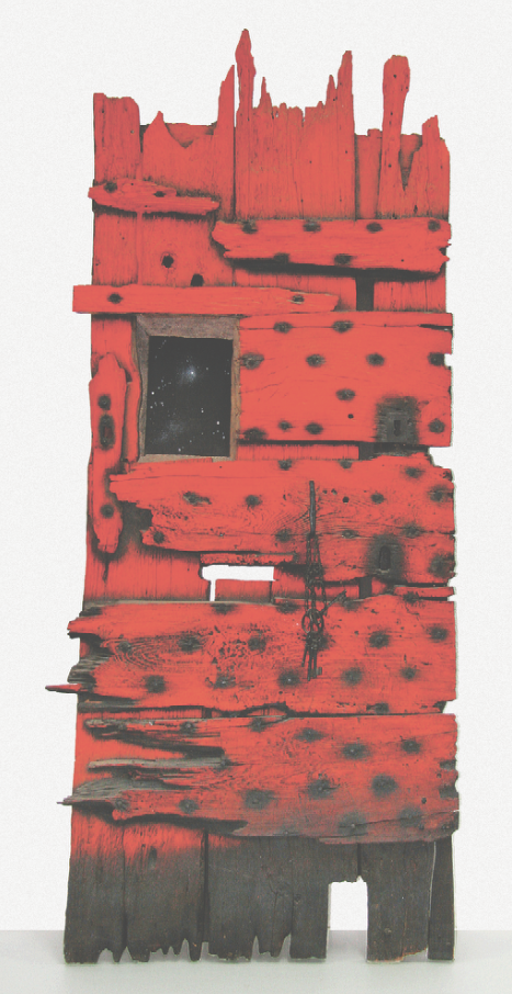 Annelies «Anatole» Nelck: «La port rouge»